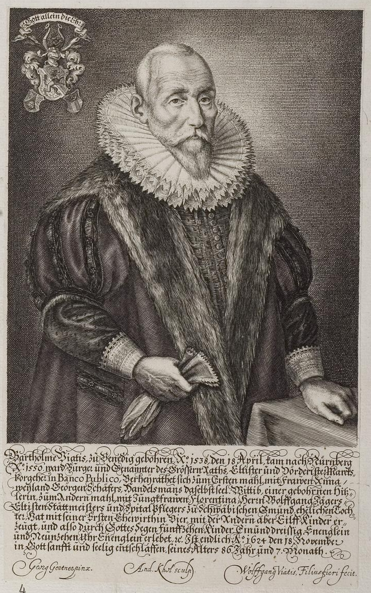 Grafik aus dem Klebeband Nr. 3 der Fürstlich Waldeckschen Hofbibliothek Arolsen Motiv: Bartholomäus Viatis (1538–1624), Nürnberger Großkaufmann